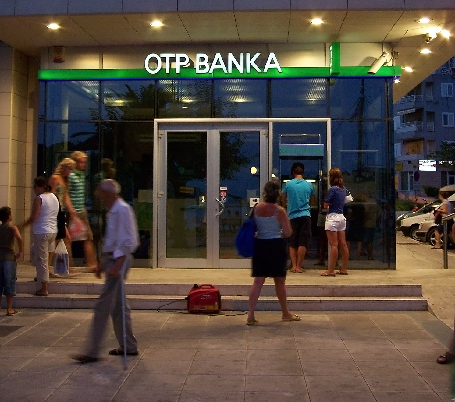 OTP bank in Makarska, Croatia